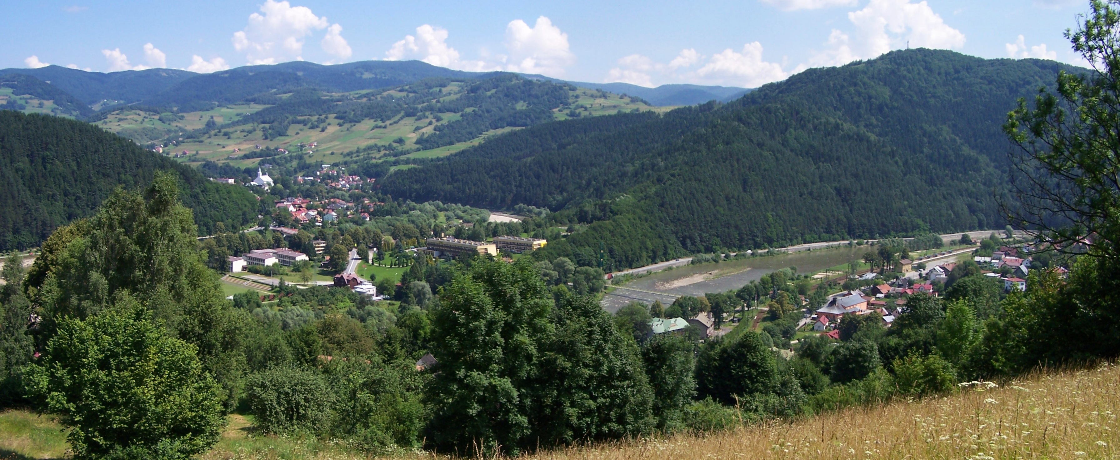 Piwniczna-Zdrój, widok ogólny. Z prawej strony góra Kicarz